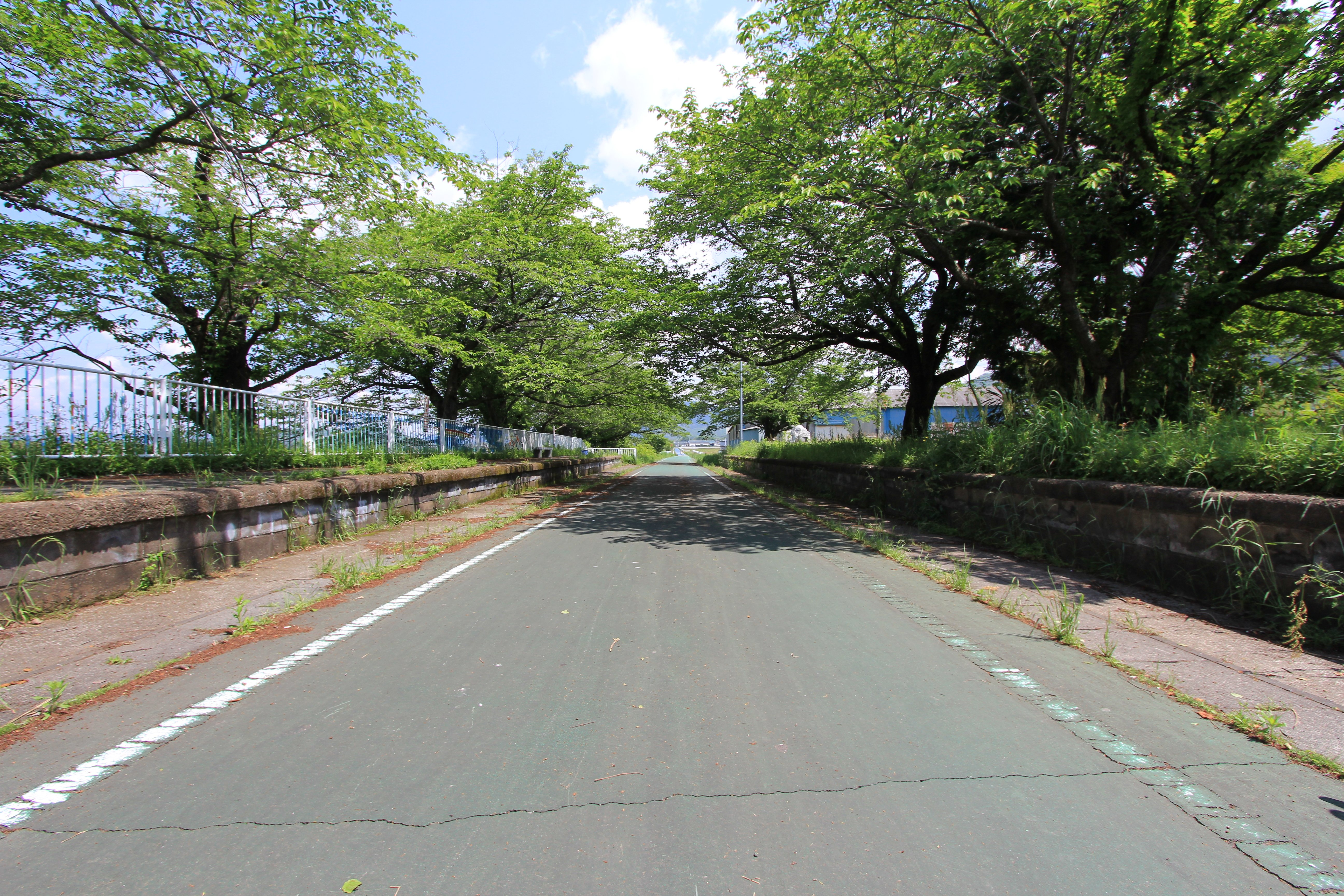 元・樺穂駅